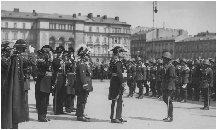 Ambassadeur Léon Noël (1888-1987), commémoration du Soldat Inconnu, Varsovie, Pologne, 1935